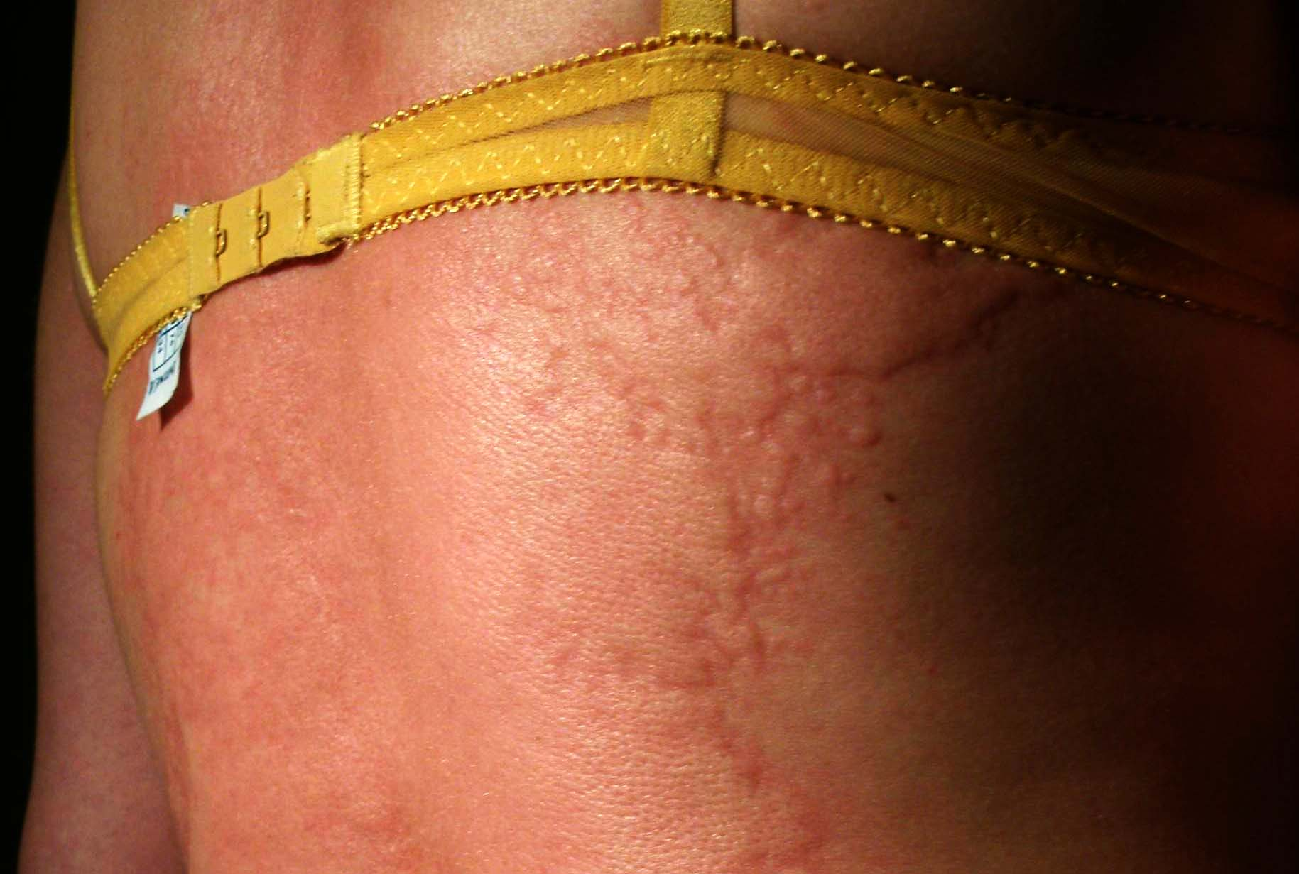 Urticaire géant